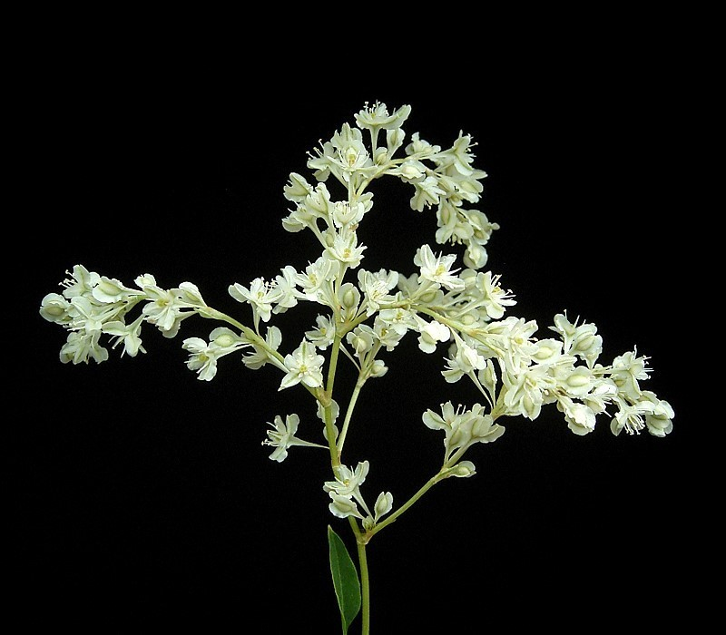 Fallopia_baldschuanica